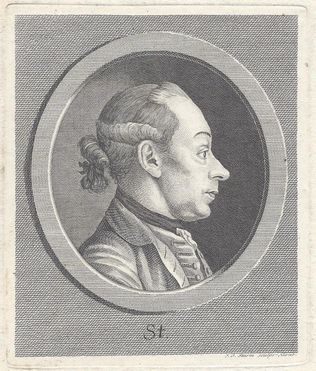 Johann Georg Sturm (1742-1793), Selbstporträt, Kupferstich um 1775